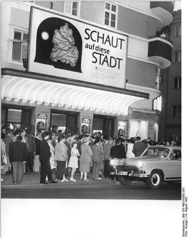 Berlin, Luxemburgplatz, Kino "Babylon" Zentralbild Krueger Bd-bs 14.8.1962 Schaut auf diese Stadt ein DEFA-Dokumentarfilm von Karl Gass, der die Entwicklung Berlins nach 1945 beinhaltet, erlebte am 13.8.1962 im Filmtheater Babylon in Berlin seine Uraufführung.